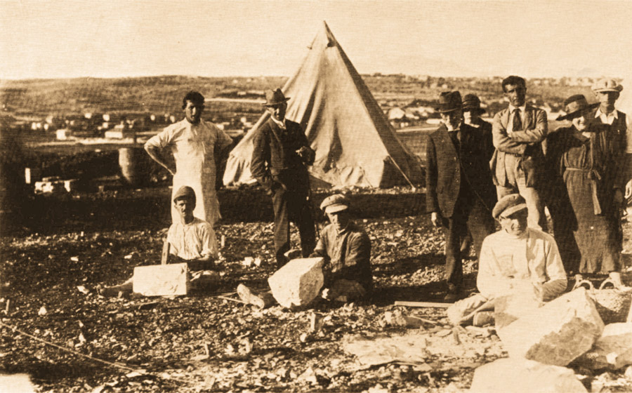 בניית ביתו של אליעזר בן יהודה בתלפיות 1921